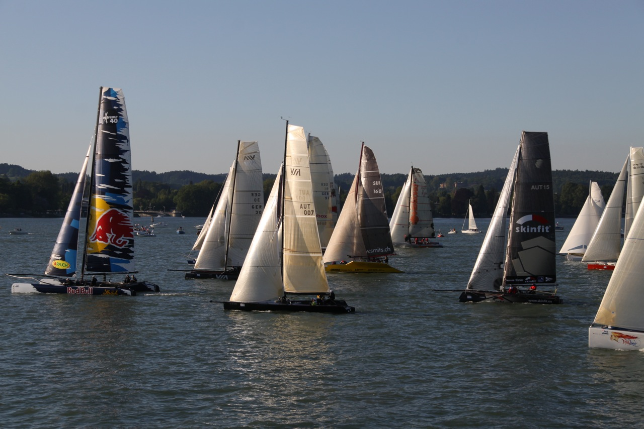 Rundum2010_ Schnelles_Feld, vorne der Extreme-40-Katamaran „Red Bull“ von Roman Hagara, rechts Fritz Trippolt mit seinem Katamaran „Skinfit“ - davor links im Hintergrund der "Sonnenkönig", ein Ventilo-28-Katamaran aus der Schweiz mit Christian Mettler, Peter Fritschi, David Mettler und Stefan Stäheli vom Segel-Sport-Club Romanshorn an der Pinneder Sieger der die 60. Auflage der RUND UM